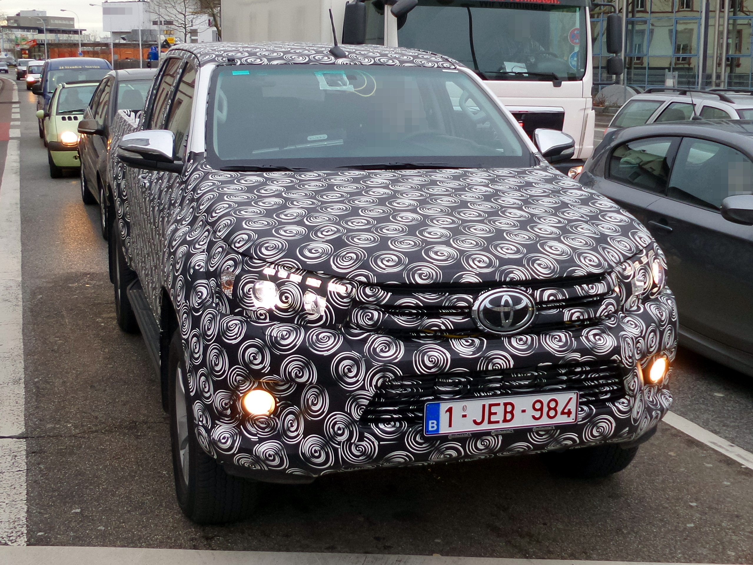 Erlkönig eines Toyota Hilux der 8. Generation